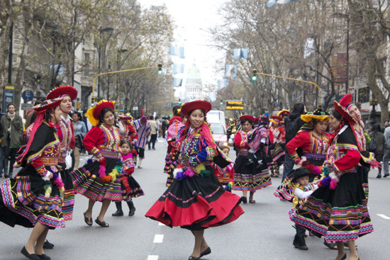 Buenos Aires Celebra Peru sobre Avenida de Mayo, 24 de julio de 2010, Argentina.